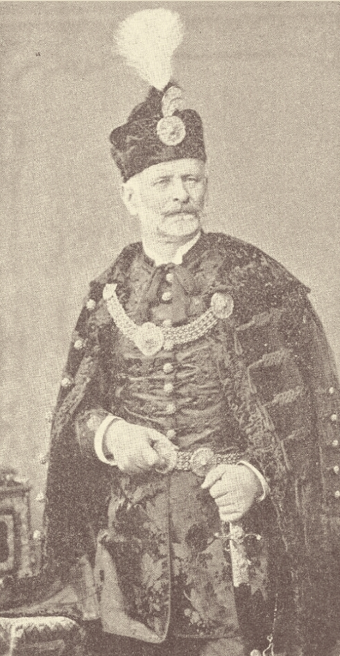 Bocsári Svatits Benő (1833-1910) zalai főispán